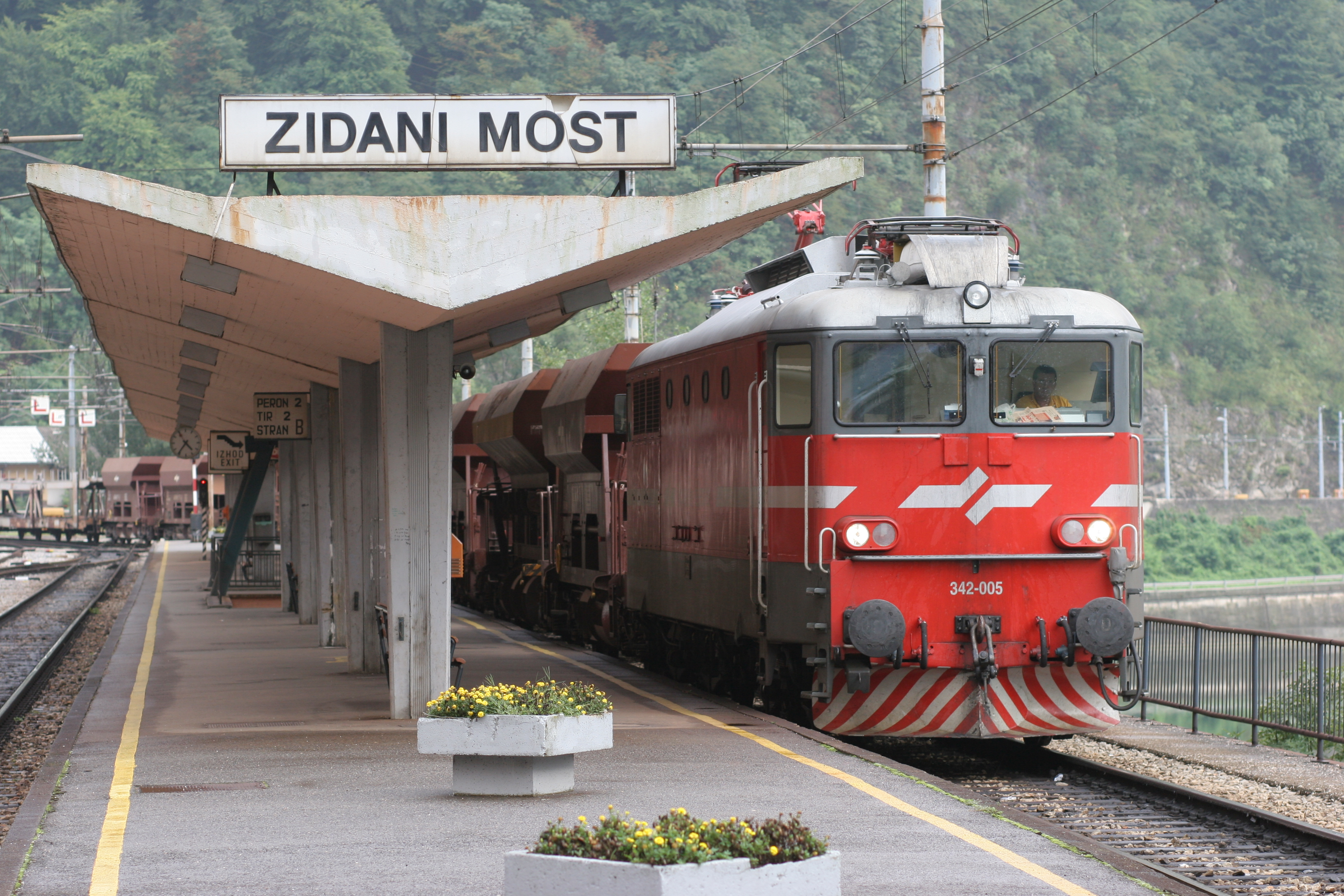 SLO - SZ - 3.1. 342-005 - 2007-08-29 - Zidani Most